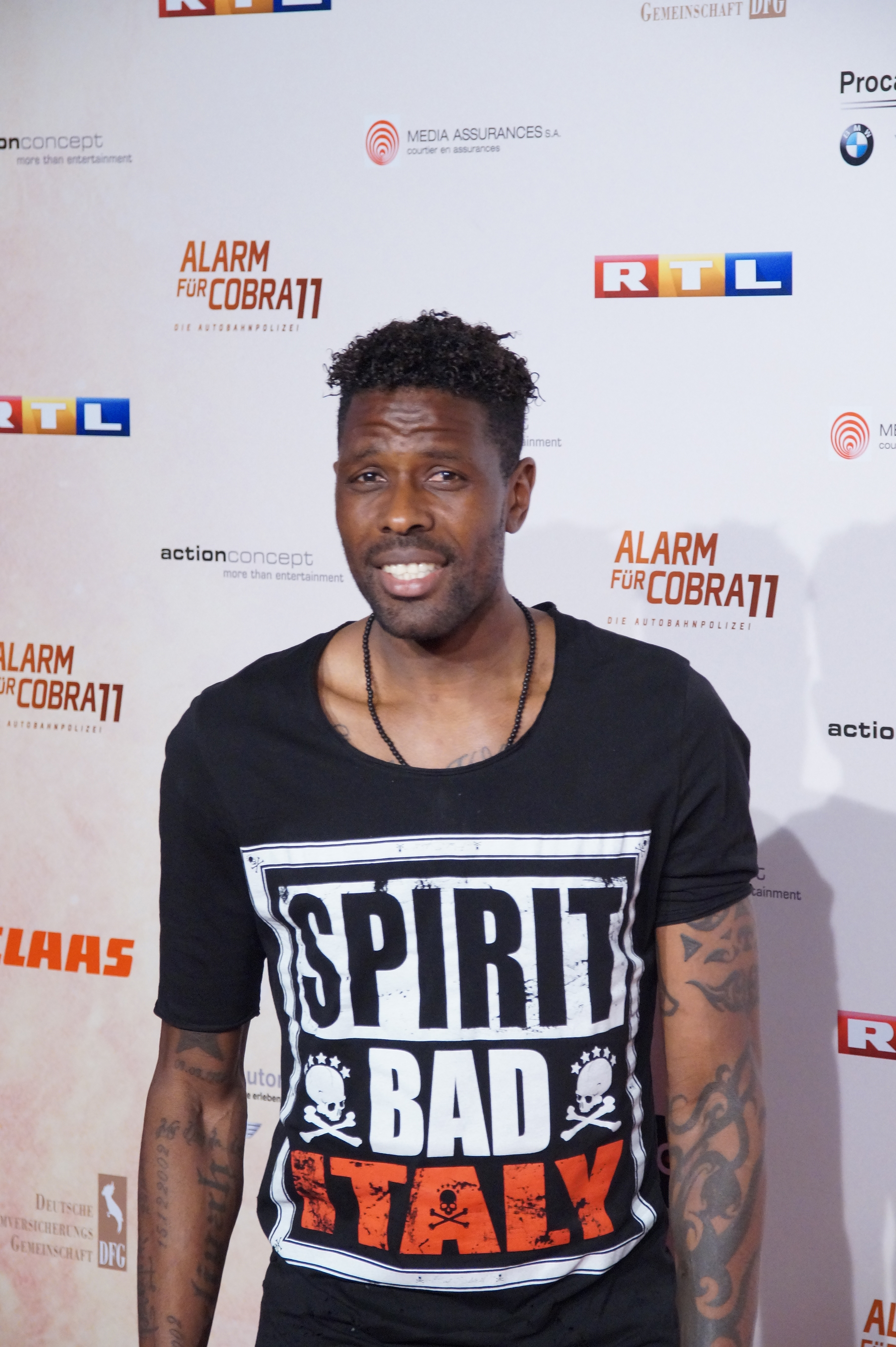 Mohamadou Idrissou bei der Premiere von der 300. Folge 'Alarm für Cobra 11', April 2016.